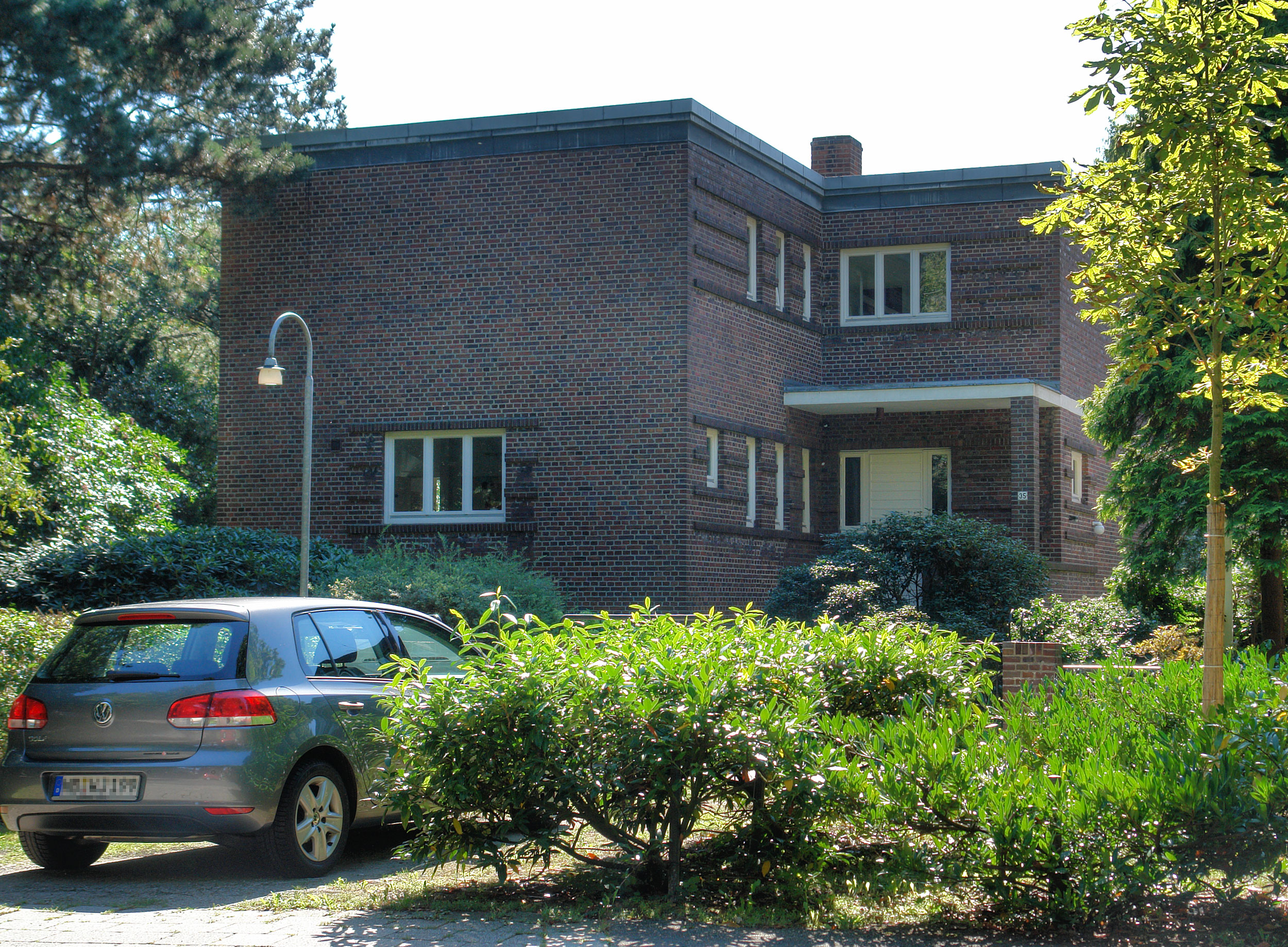 Haus Grohne in Bremen, Friedrich-Mißler-Straße 35Das abgebildete Objekt ist ein geschütztes Kulturdenkmal in der Freien Hansestadt Bremen, mit der Nr. 0422 beim Landesamt für Denkmalpflege registriert.